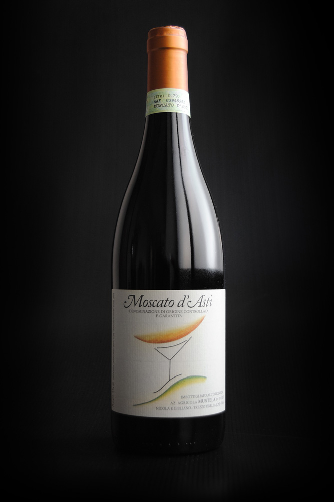 bottiglia di Mustela - Moscato d'Asti Docg 2010, a Trezzo Tinella